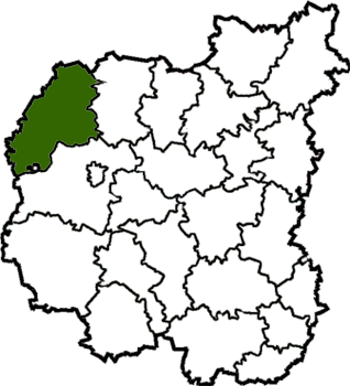 Ripchanskyi-Raion map